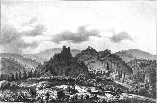 Crémieu